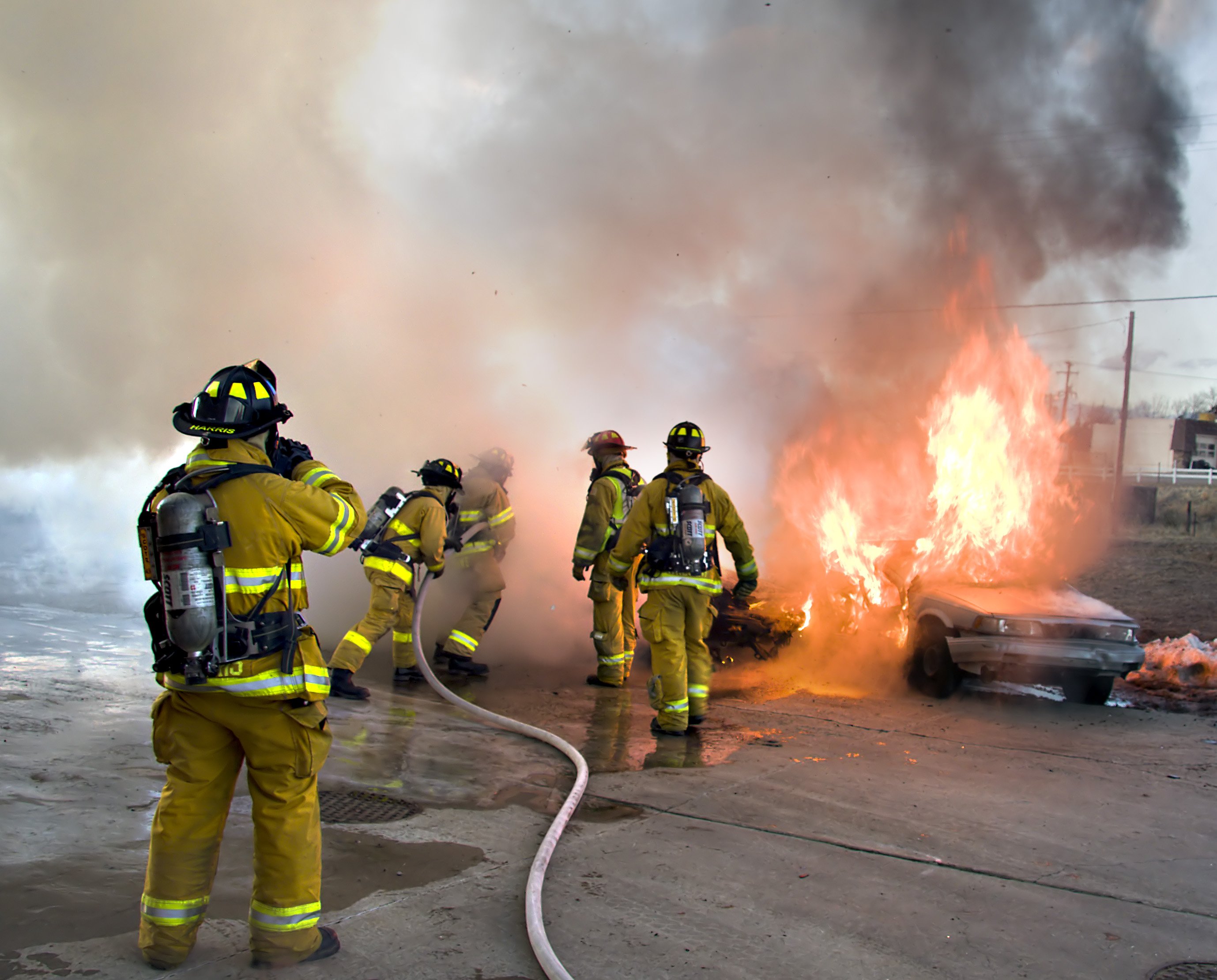 Firemen at work